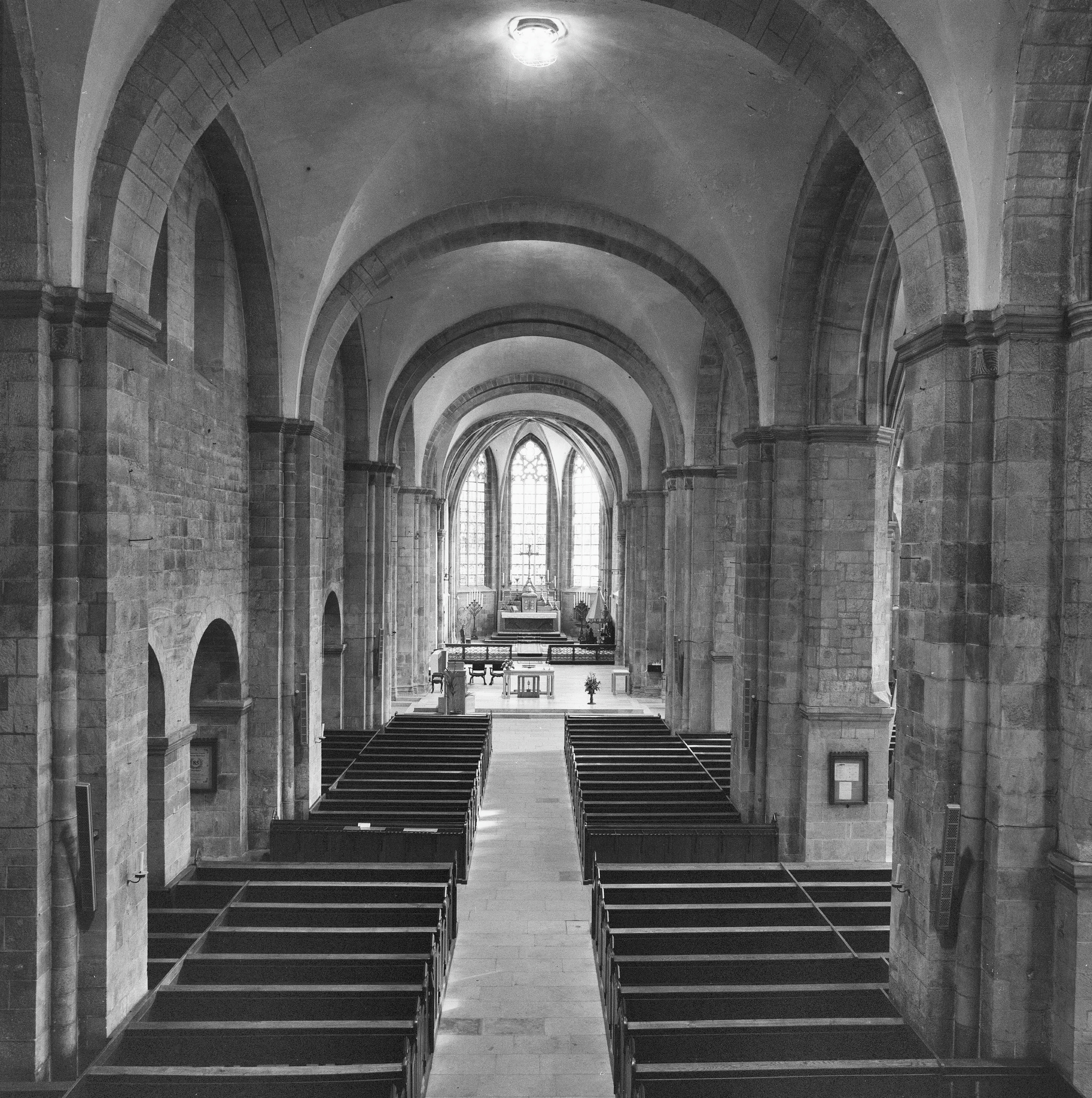 Rooms-katholieke Sint-Plechelmusbasiliek: Interieur, overzicht naar het oosten met altaar (opmerking: Gefotografeerd voor Monumenten In Nederland Overijssel)